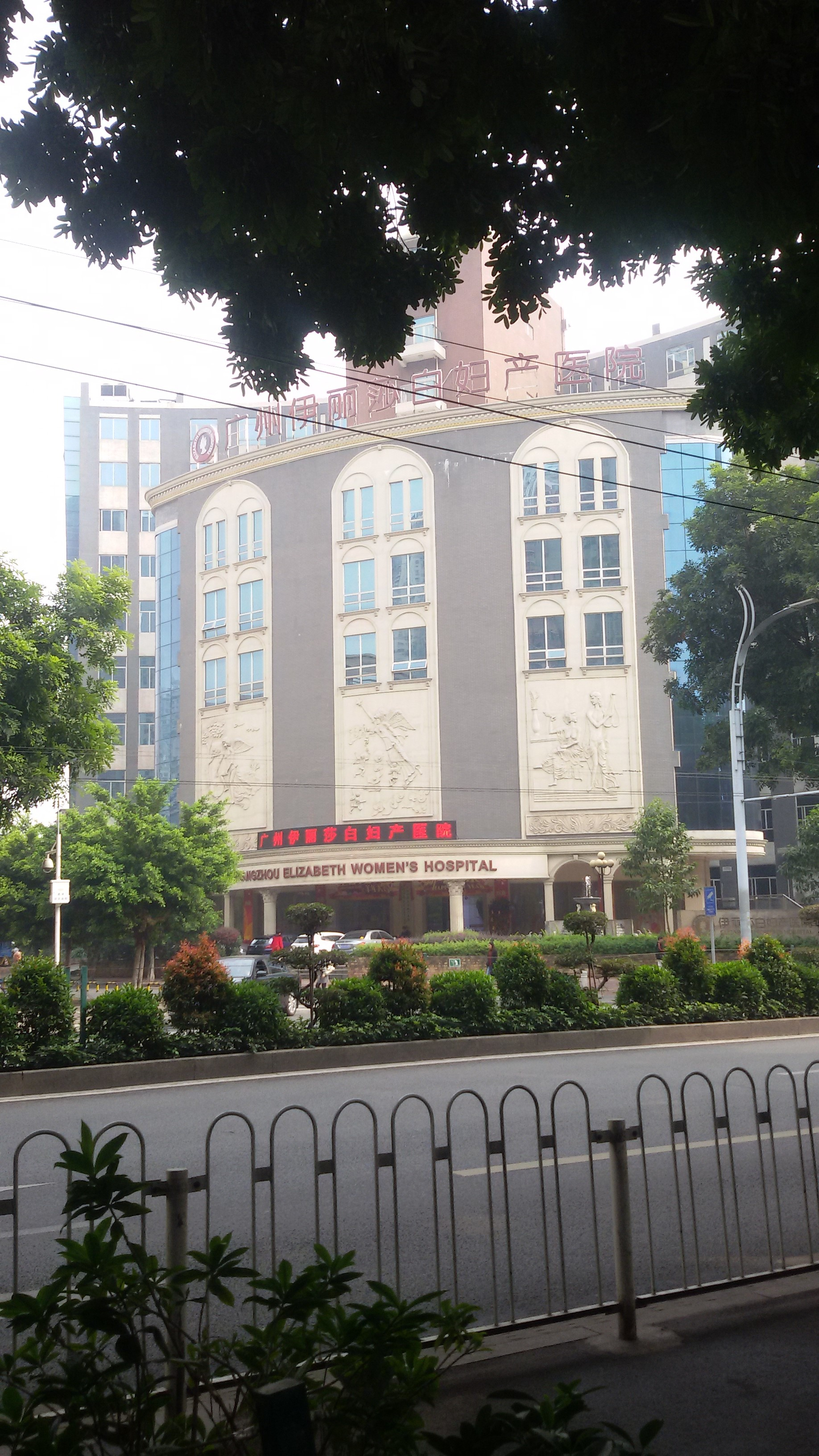 粵語: 廣州伊麗莎白婦產醫院